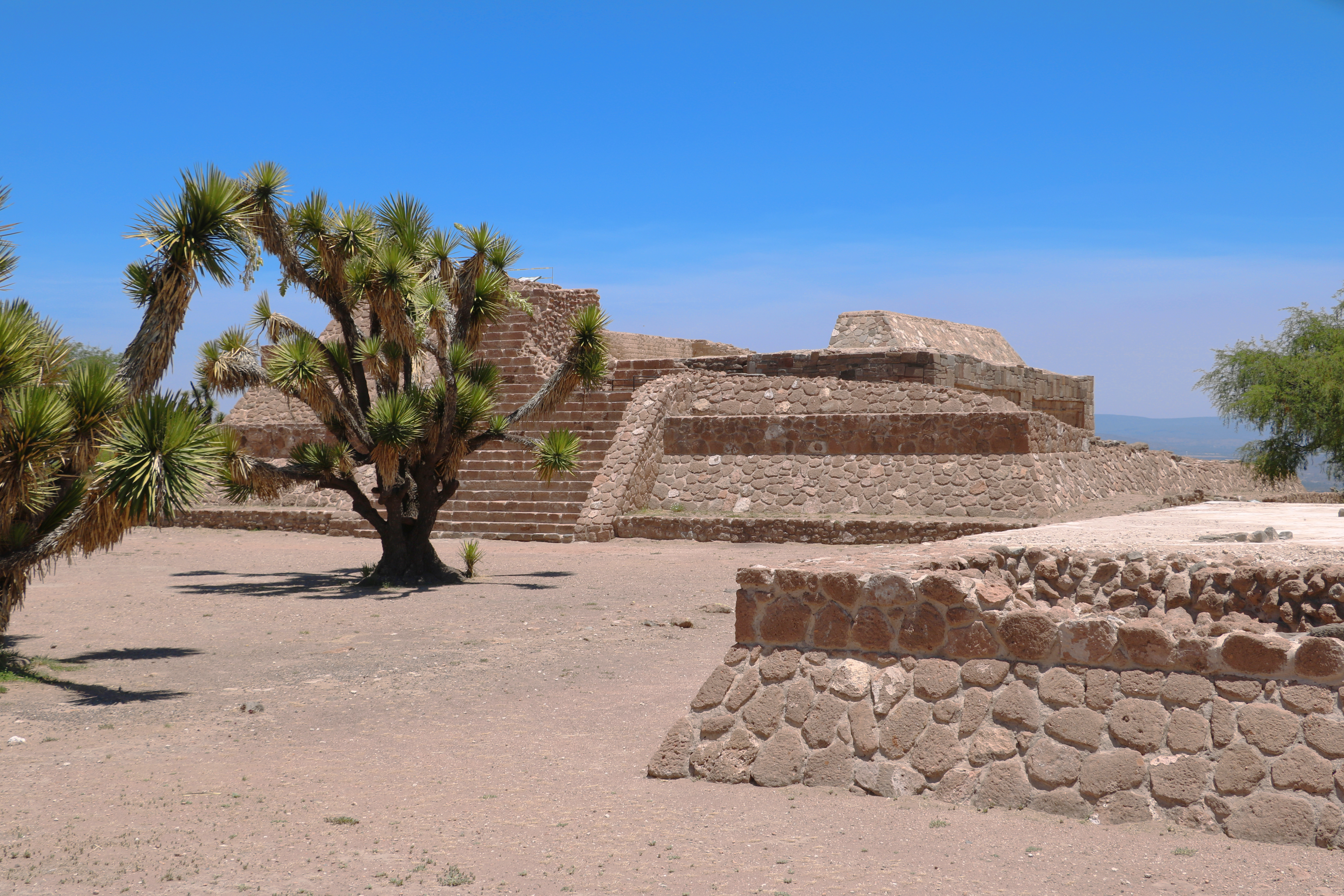 Zona arqueológica de Pahñú o Pañhú en el municipio de Tecozautla, Hidalgo en México. Templo a Xiuhtecutli - Huehueteotl.